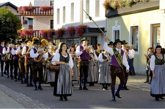 Musikverein Lafnitz